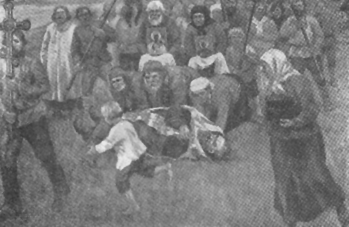 Обряд катания священника по ниве после жатвы, чтобы вернуть полю силу рождать хлеб.